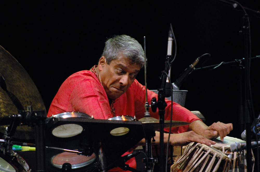 Indian percussion player Trilok Gurtu in Warsaw, September 2007